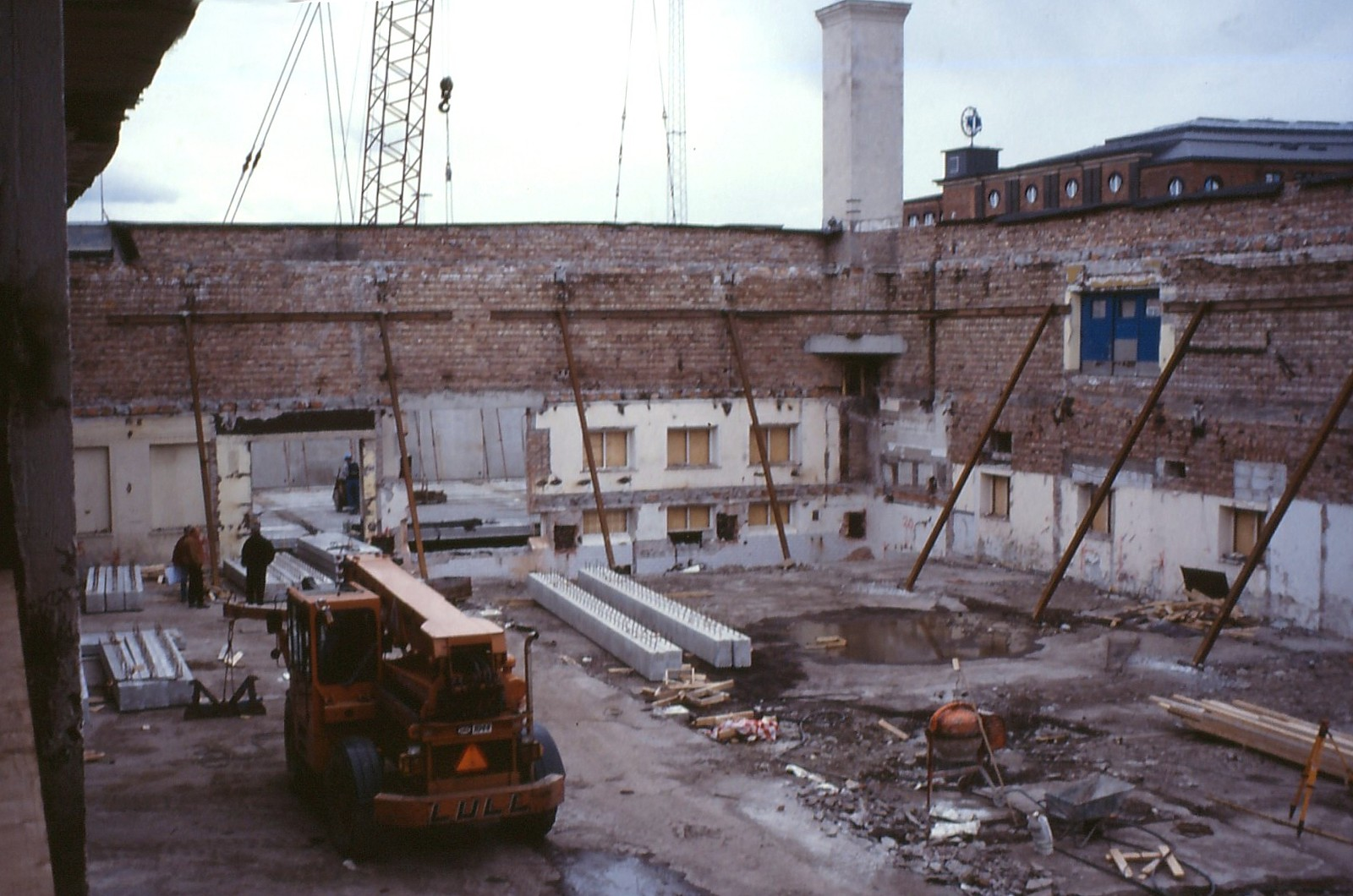 Banankompaniet i Frihamnen, ombyggnad/rivningsarbeten 1995